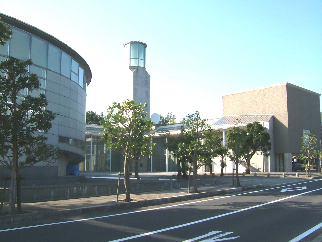 松江市八束支所（旧・八束町役場）